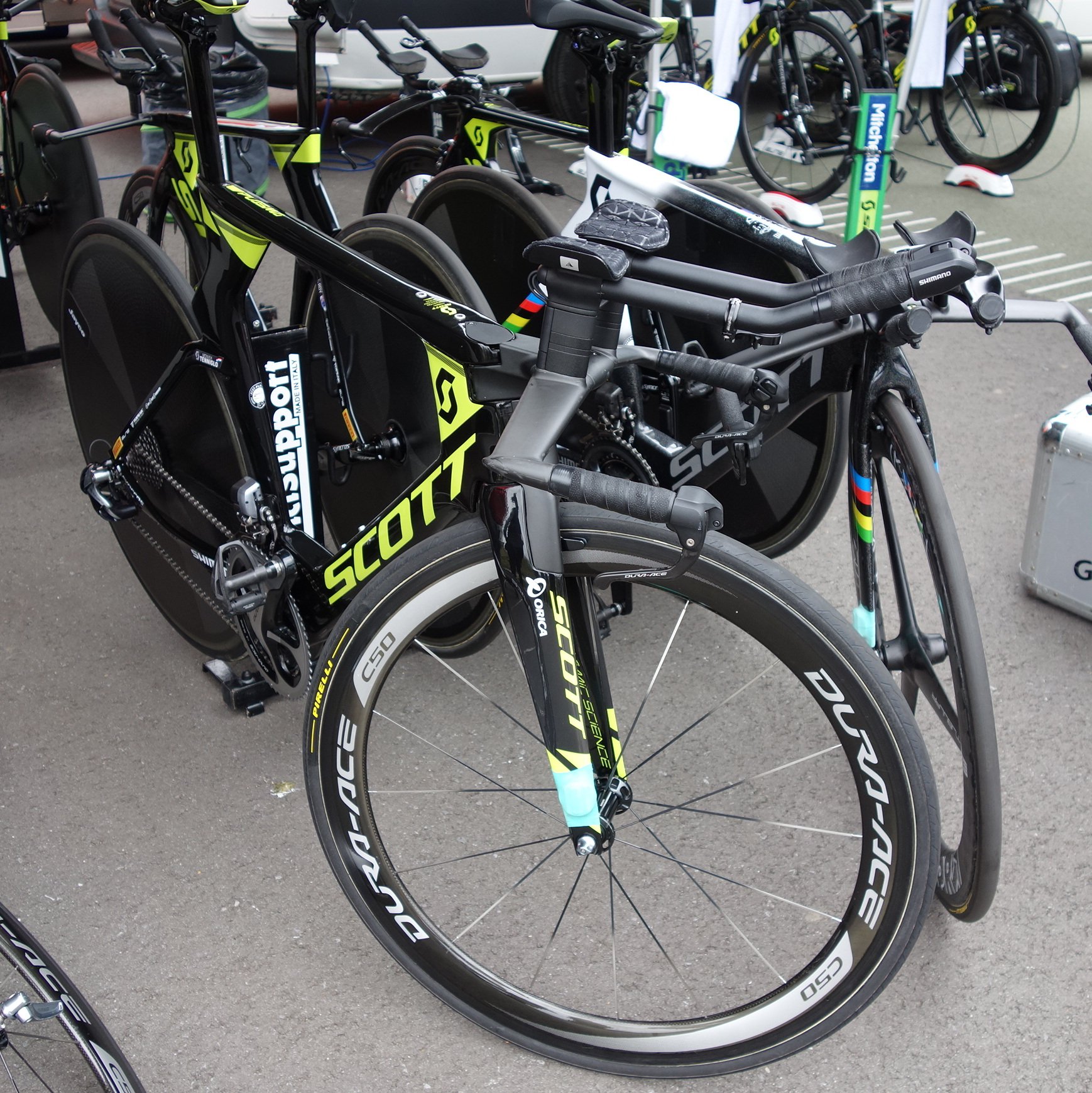 Fietsen van Mitchelton-Scott bij de proloog op het Tom Dumoulin Bike Park in Sittard in de Boels Ladies Tour 2019